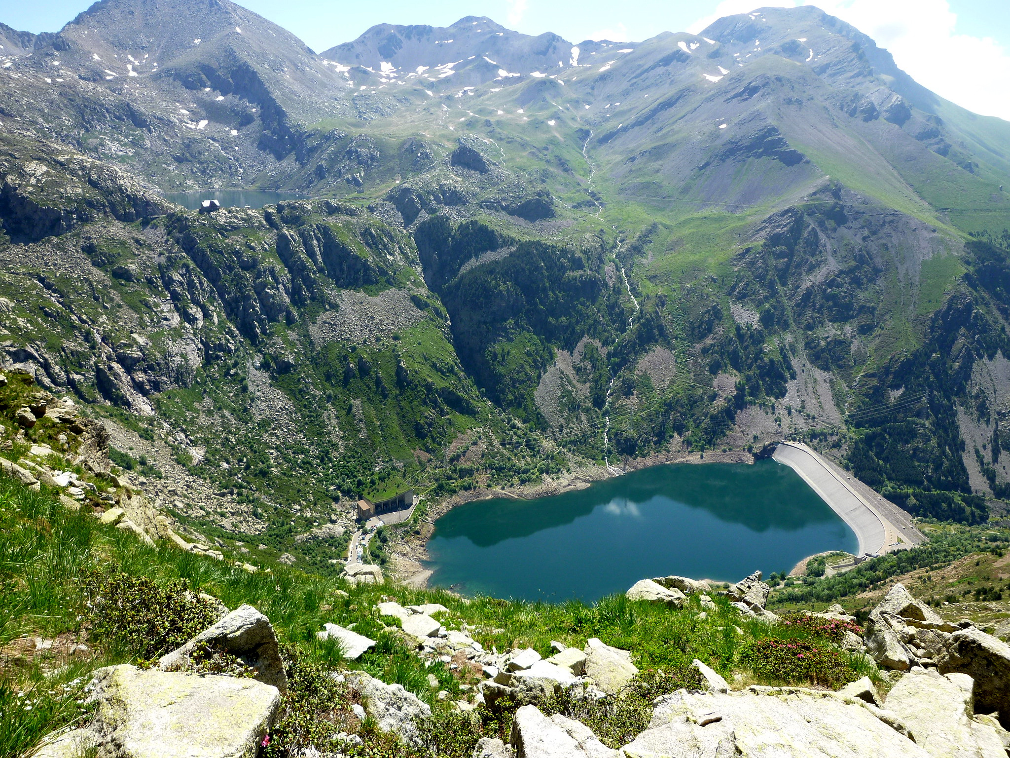 La presa de Sallente des del camí a la collada de Font Sobirana. Vall Fosca (Pallars Jussà - Catalunya)